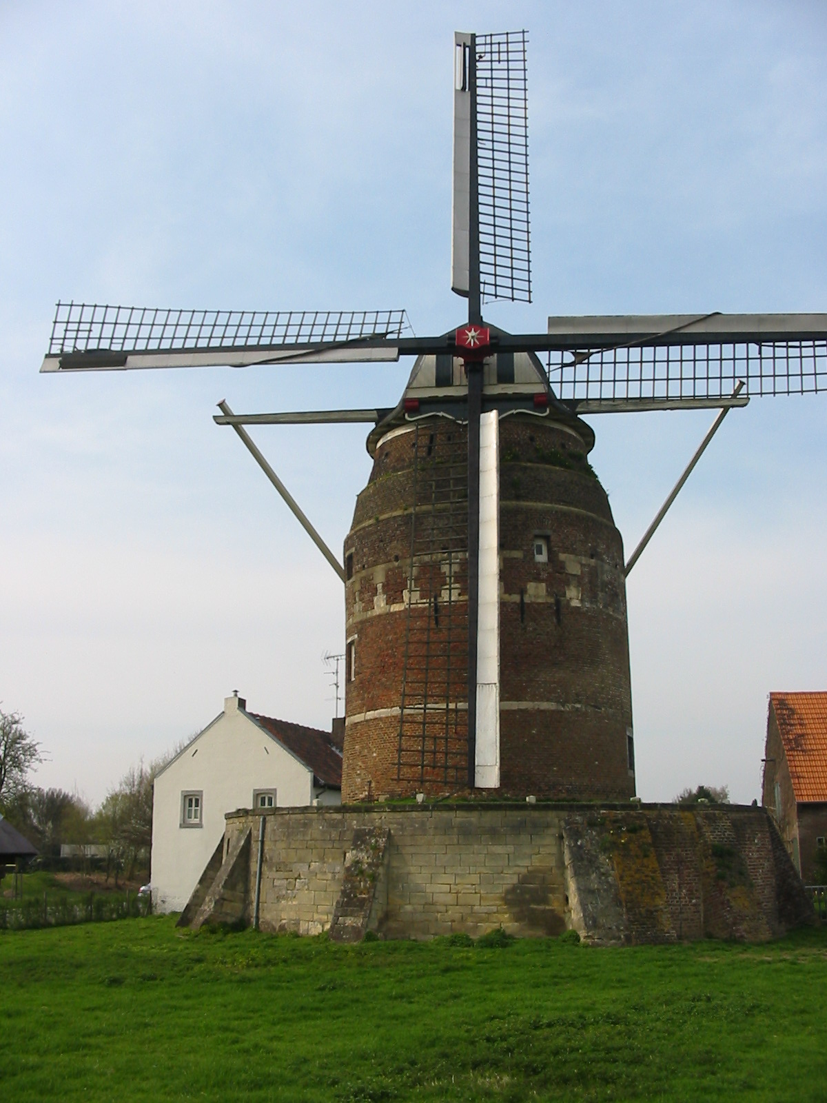 Torenmolengronsveld.jpg